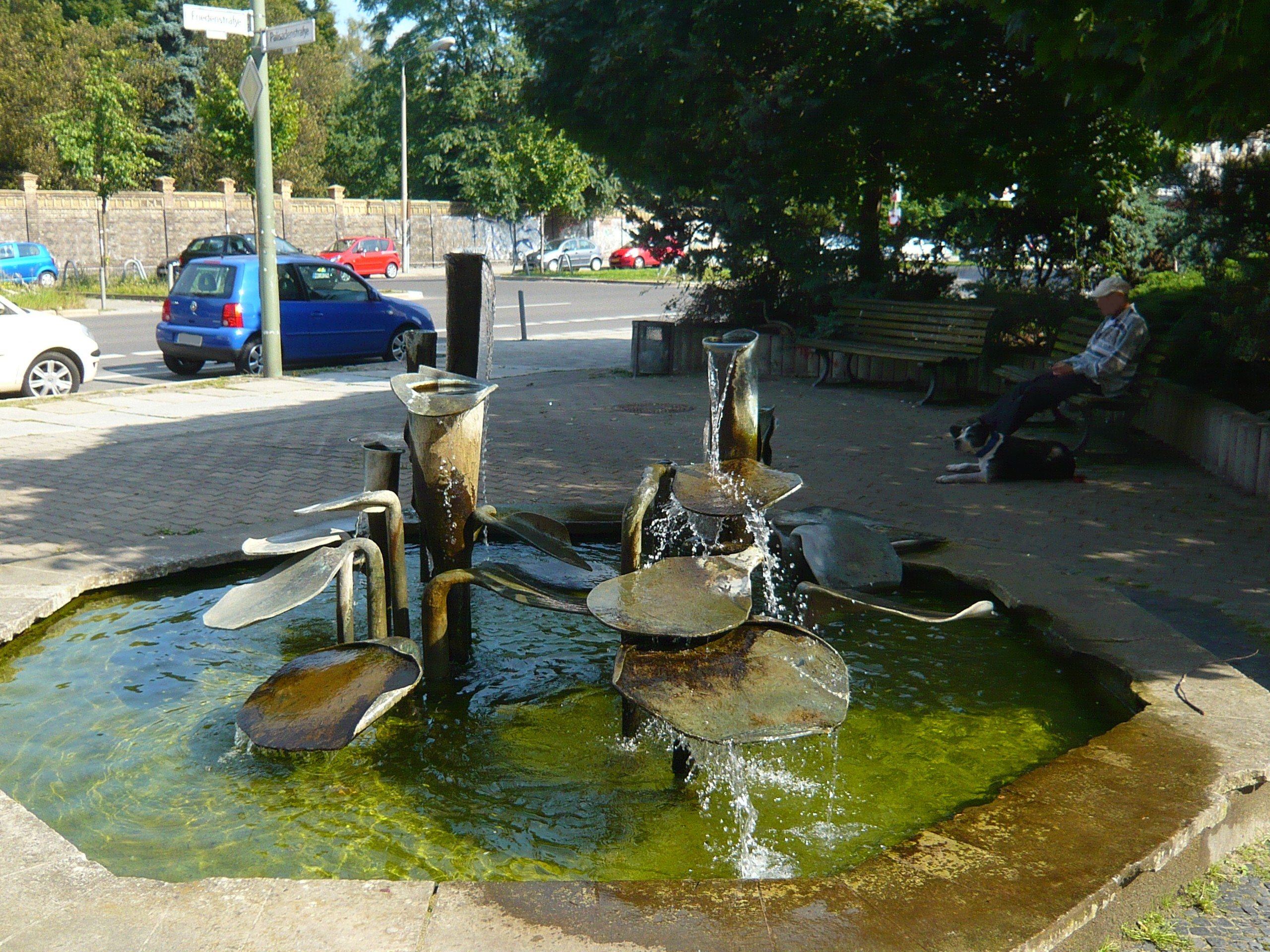 Lotos- oder Seerosenbrunnen an der Ecke Friedenstraße/Palisadenstraße in Berlin-Friedrichshain. Künstler: Jan Skuin und Rüdiger Roehl